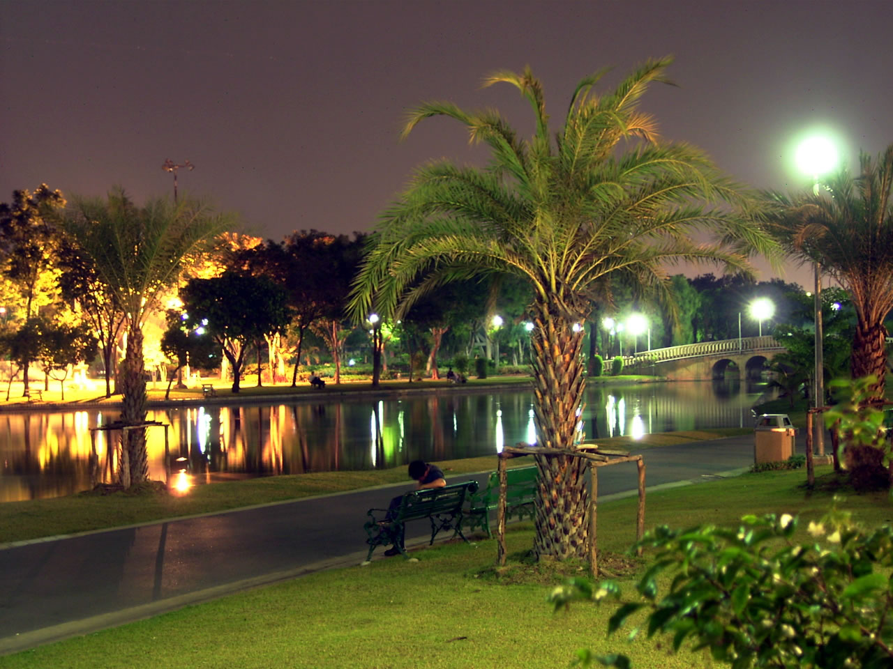 สวนจตุจักรยามค่ำคืน มุมมองจาก รถไฟฟ้ามหานครสถานีสวนจตุจักร (ทางออกหมายเลข2) ถ่ายโดยธัญกิจ หมวดหมู่:สวนสาธารณะในกรุงเทพมหานคร หมวดหมู่:ภาพสถานที่ ในกรุงเทพมหานคร สัญญาอนุญาต The present photo is taken or owned by Thanyakij. The camera used was: Ricoh Caplio GX.